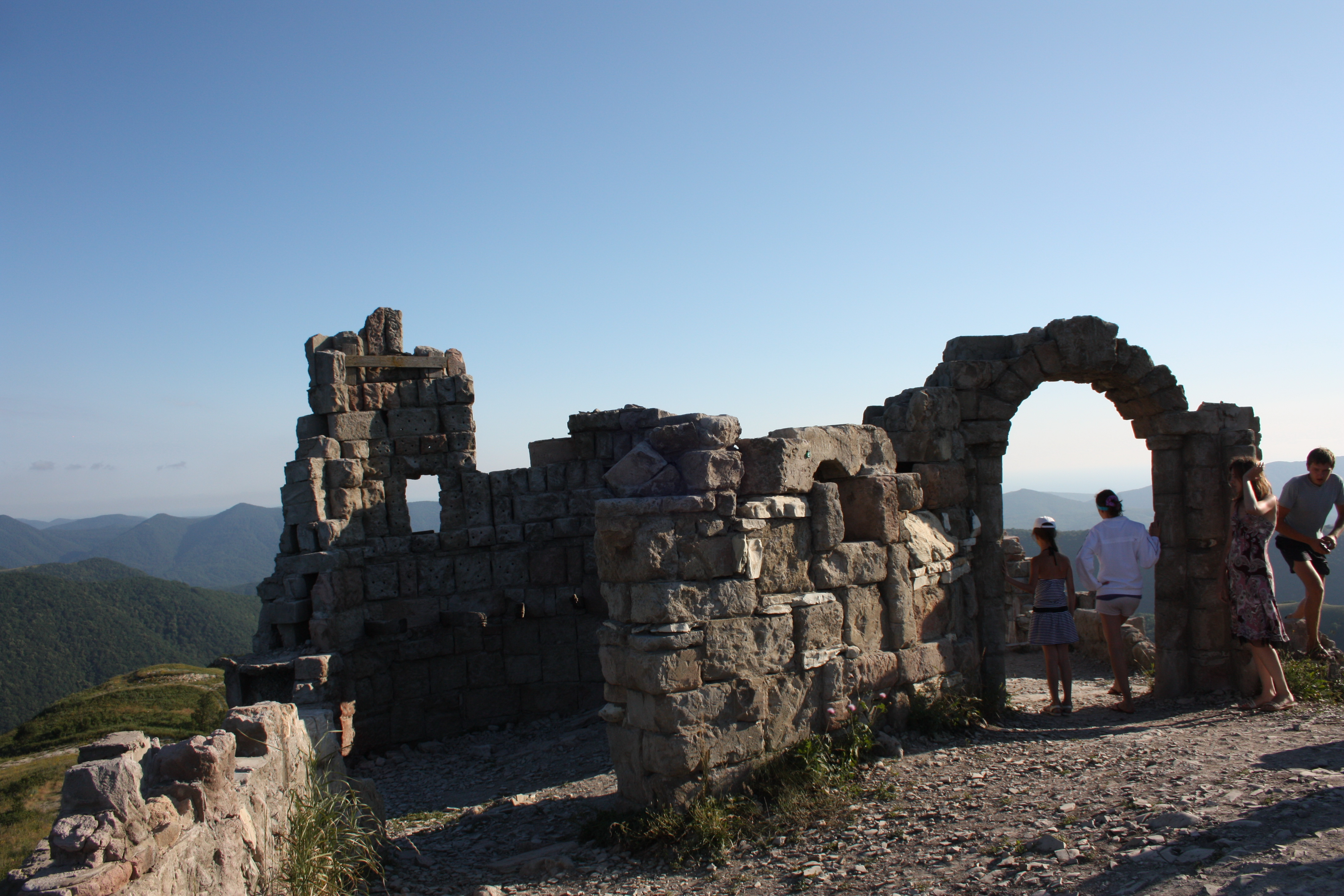 Место съемок сериала "Грозовые ворота" близ Геленджика